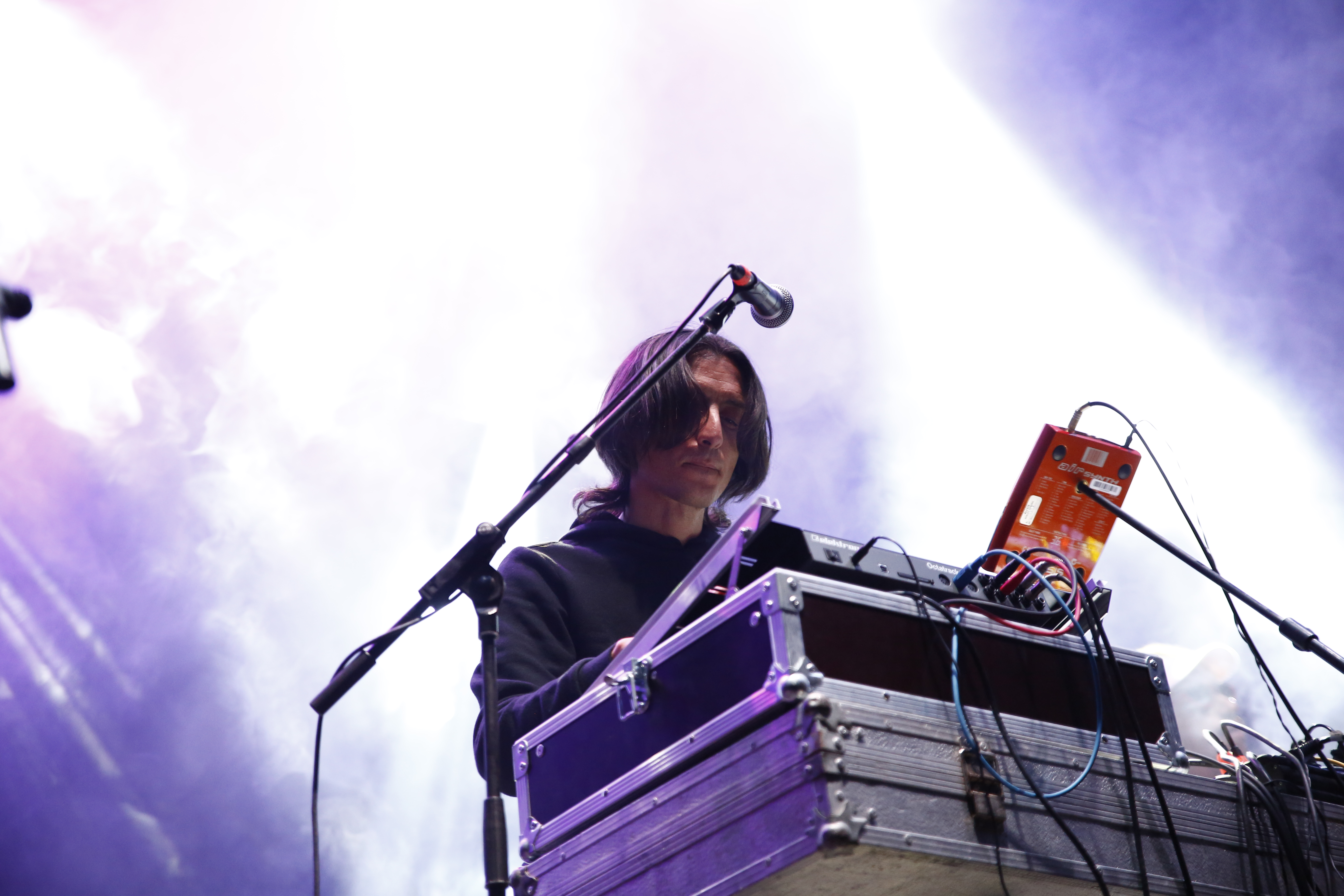 Esteban Fraile Maldonado -Banin- del grupo Los Pilotos, en el festival Palencia Sonora 2019.